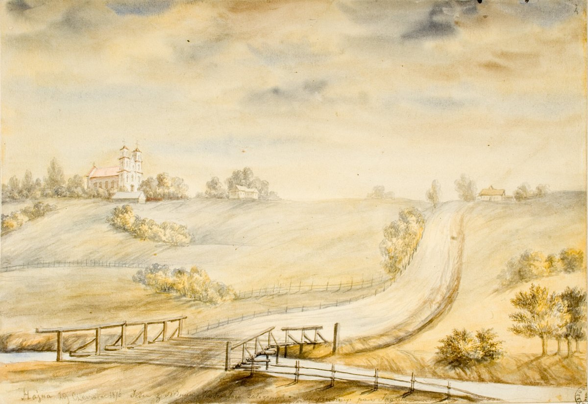 Беларуская (тарашкевіца): Гайна (Hajna). Касьцёл Унебаўзяцьця Найсьвяцейшай Панны Марыі